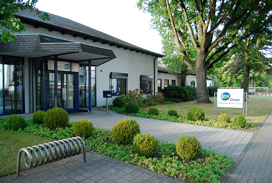 Zeven Aspe dmk